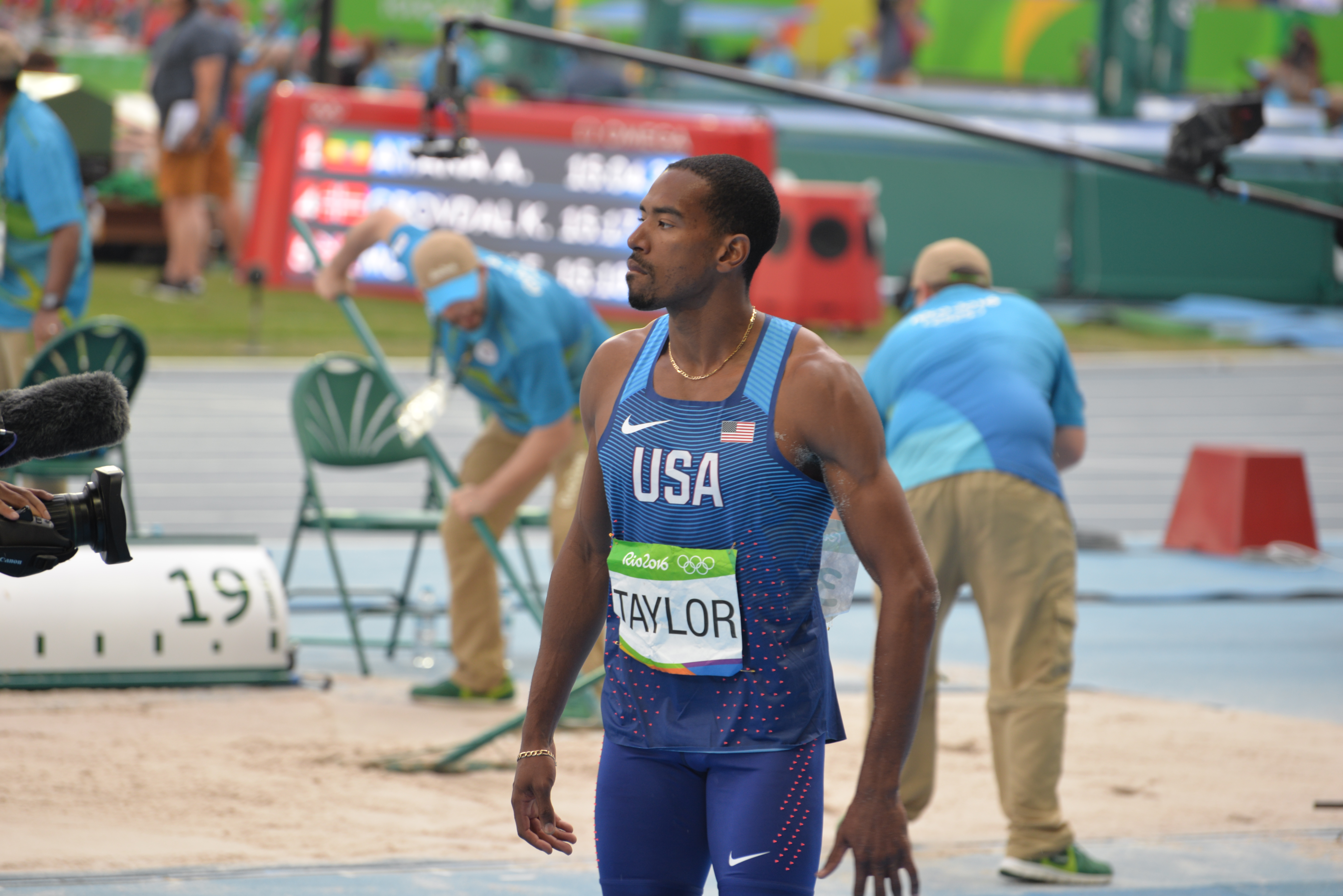 Christian Taylor lors du concours du triple saut au jo de Rio 2016